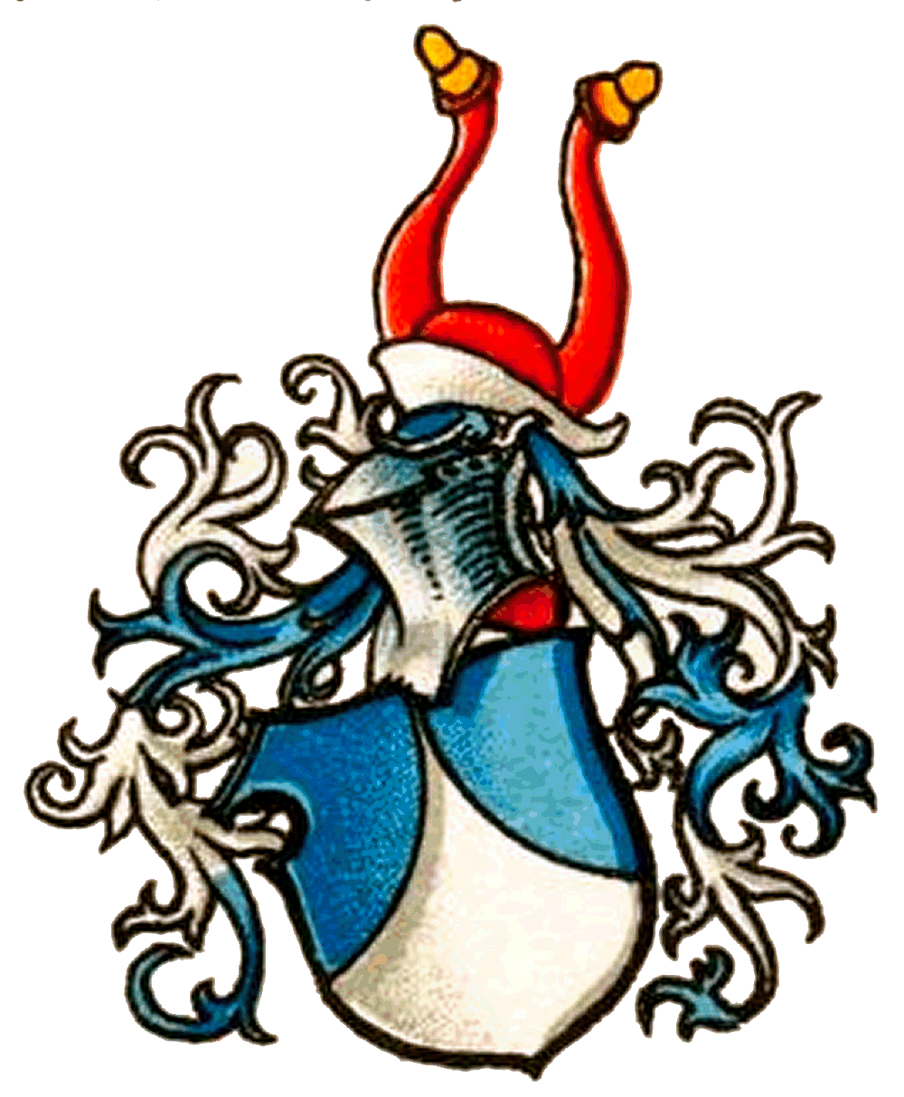 Stammwappen derer von Künsberg